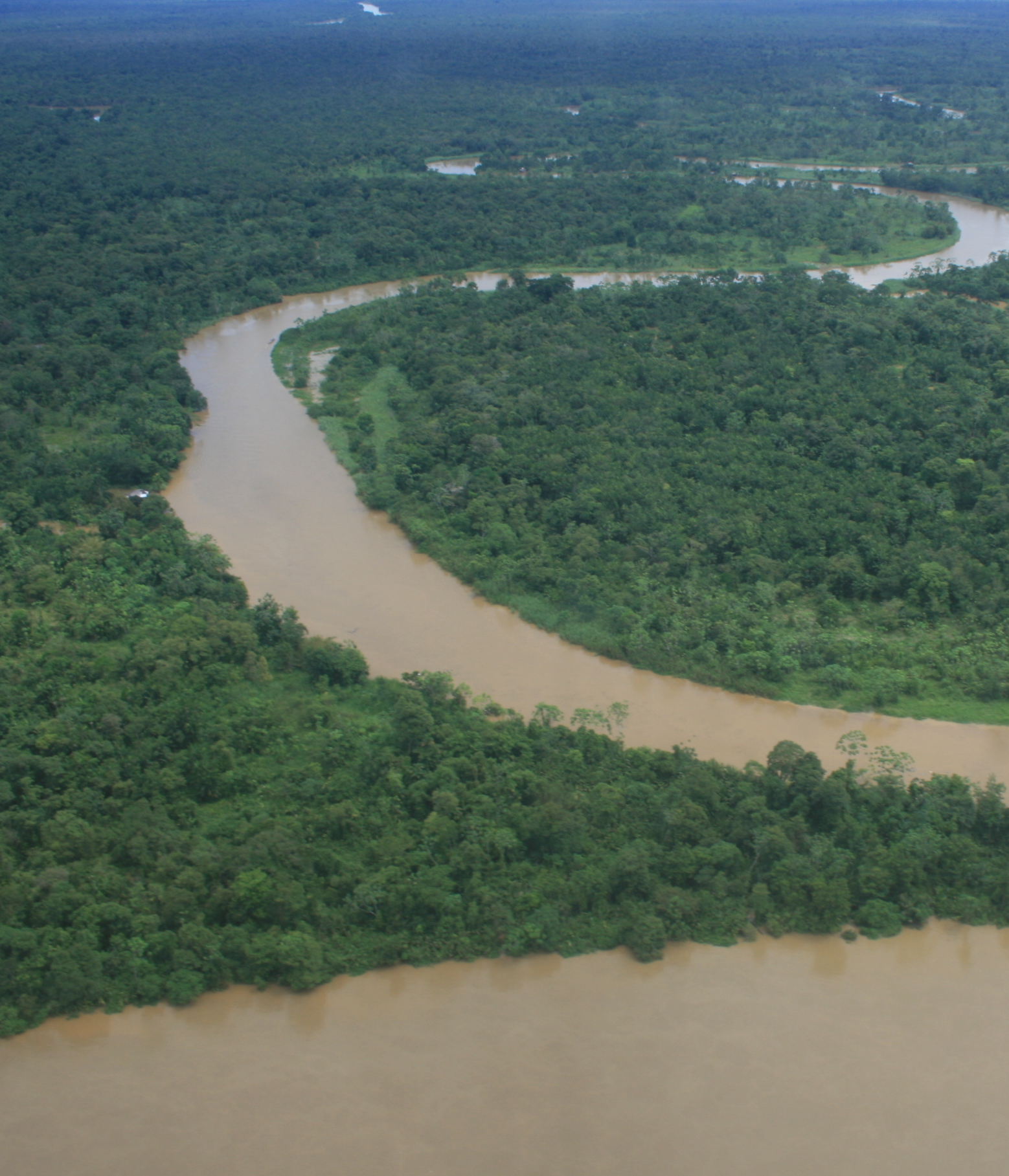 Panoramica del río Atrato